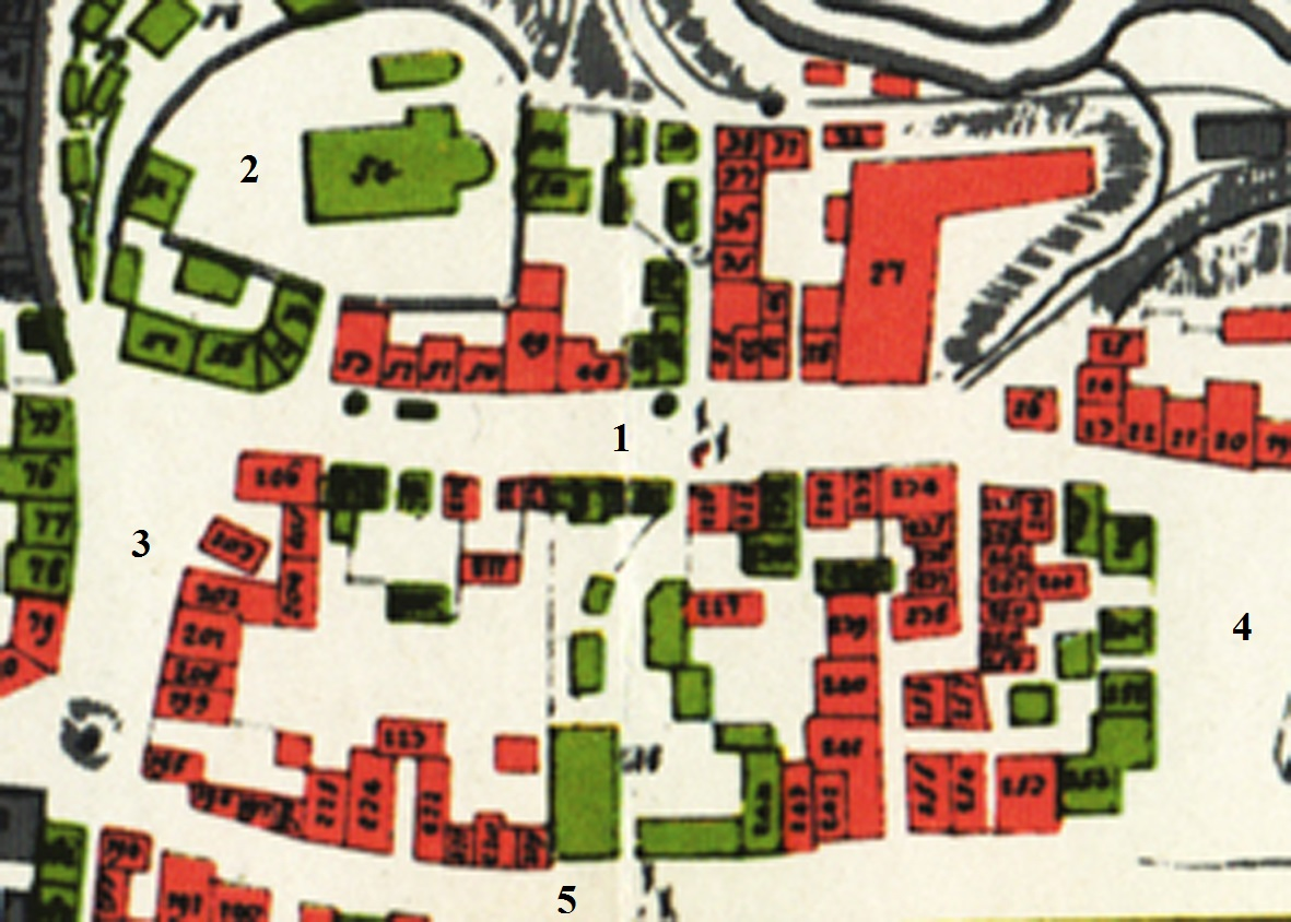 Alstadtvierterl St. Michael Gustavstraße. Grün: Nürnberger Anwesen. Gelb: Ansbach. Rot Domprobst Bamberg. Kartenausschnitt bearbeitet v. Superikonoskop. 1: Bauergasse, heute Gustavstraße, 2: Kirchplatz mit Stadtkirche St. Michael und (abgegangene) Heiliggrabkapelle, 3: Marktplatz, 4: Köngsplatz, 5: Rosengasse, heute Königstraße